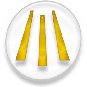 Symbol of Druidism, golden version.